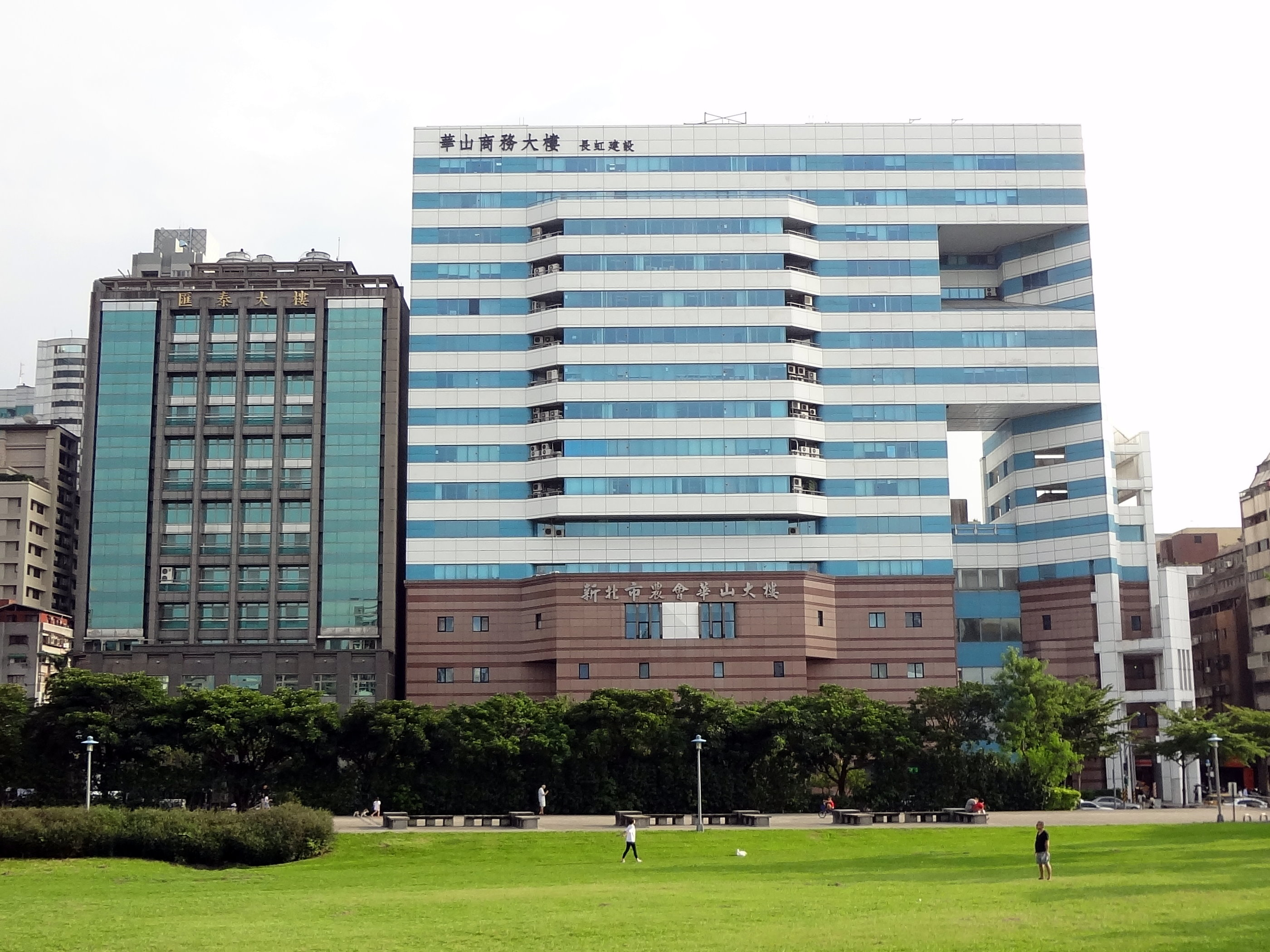 匯泰大樓與華山商務大樓。